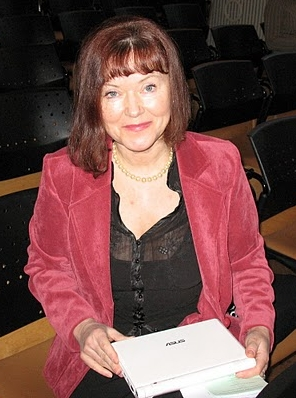 Maret Merisaar Erakonna Eestimaa Rohelised Tallinna piirkonna asutamiskoosolekul Tallinna Ülikooli peahoones